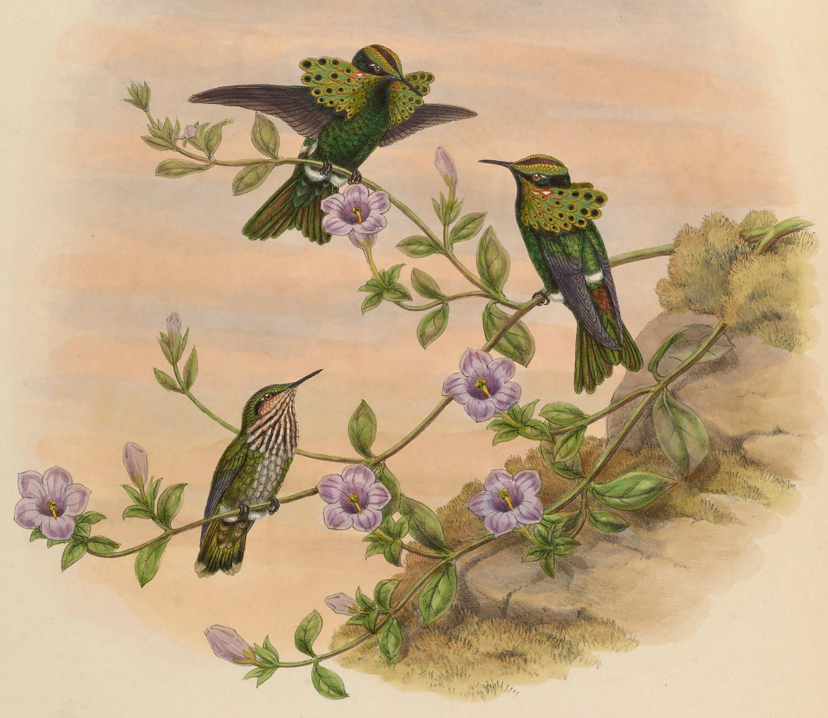 Lophornis pavoninus, Salvin y Godman, 1882. Ilustración en A monograph of the Trochilidae, or family of humming-birds de John Gould.